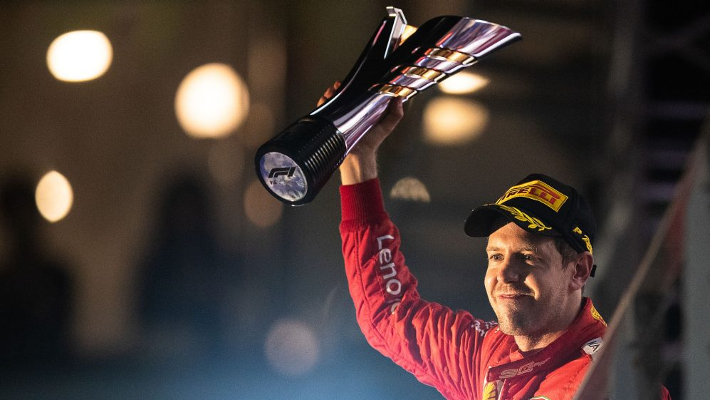 a